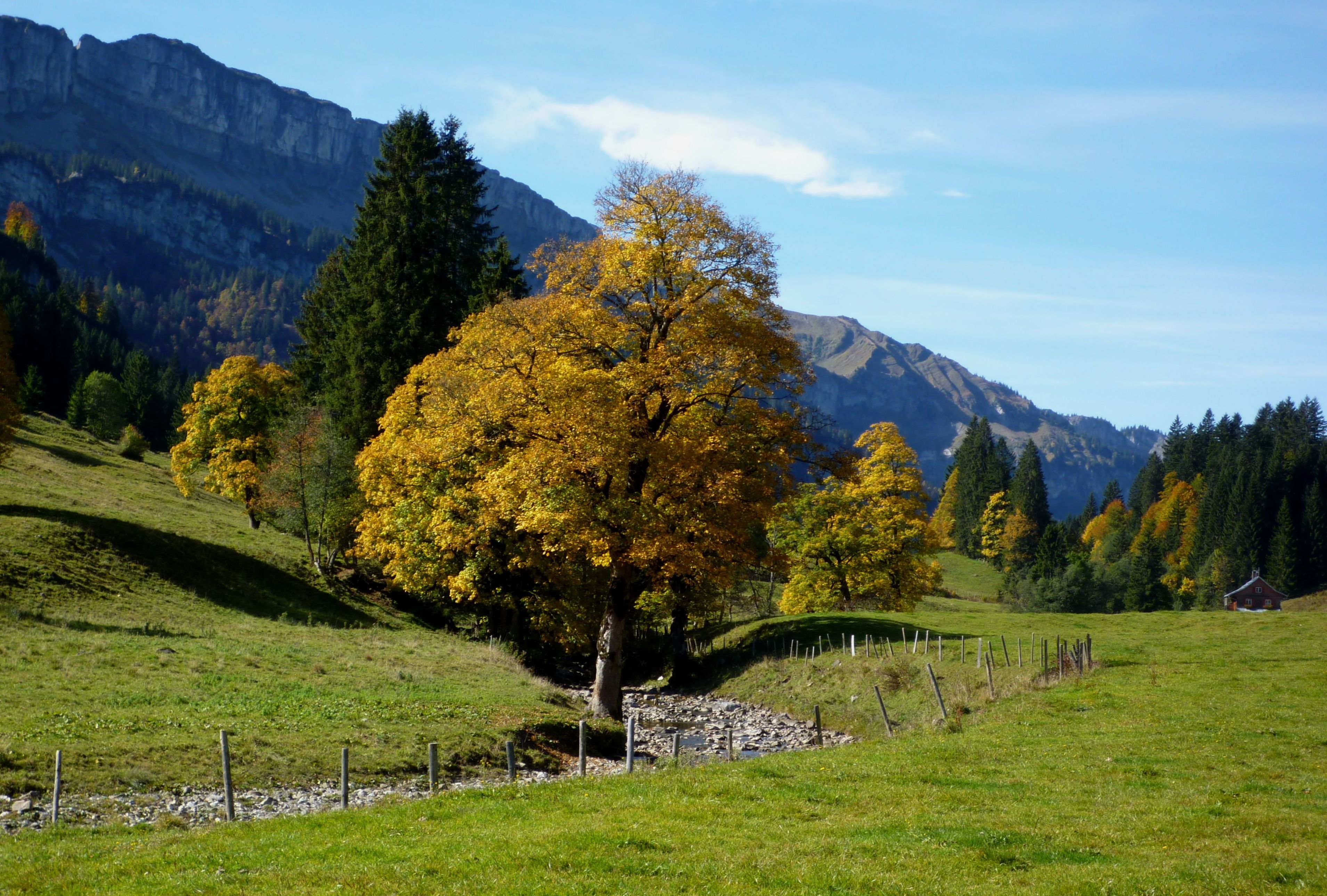 Oberstdorf - Rohrmoos 1070 ü.NN, Starzlachtal,Ahorn im Herbst